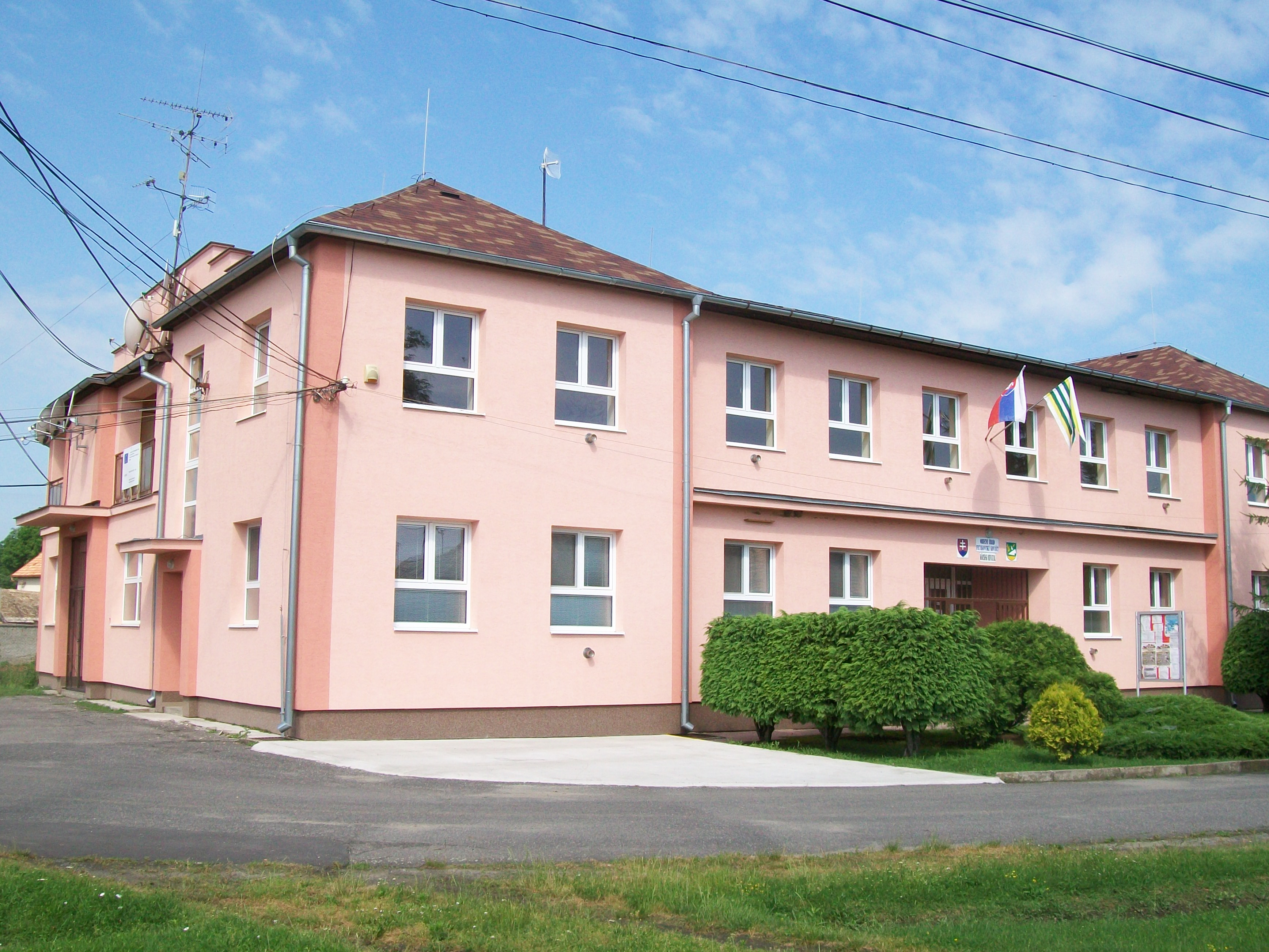 Obecný úrad vo Fiľakovských Kováčoch